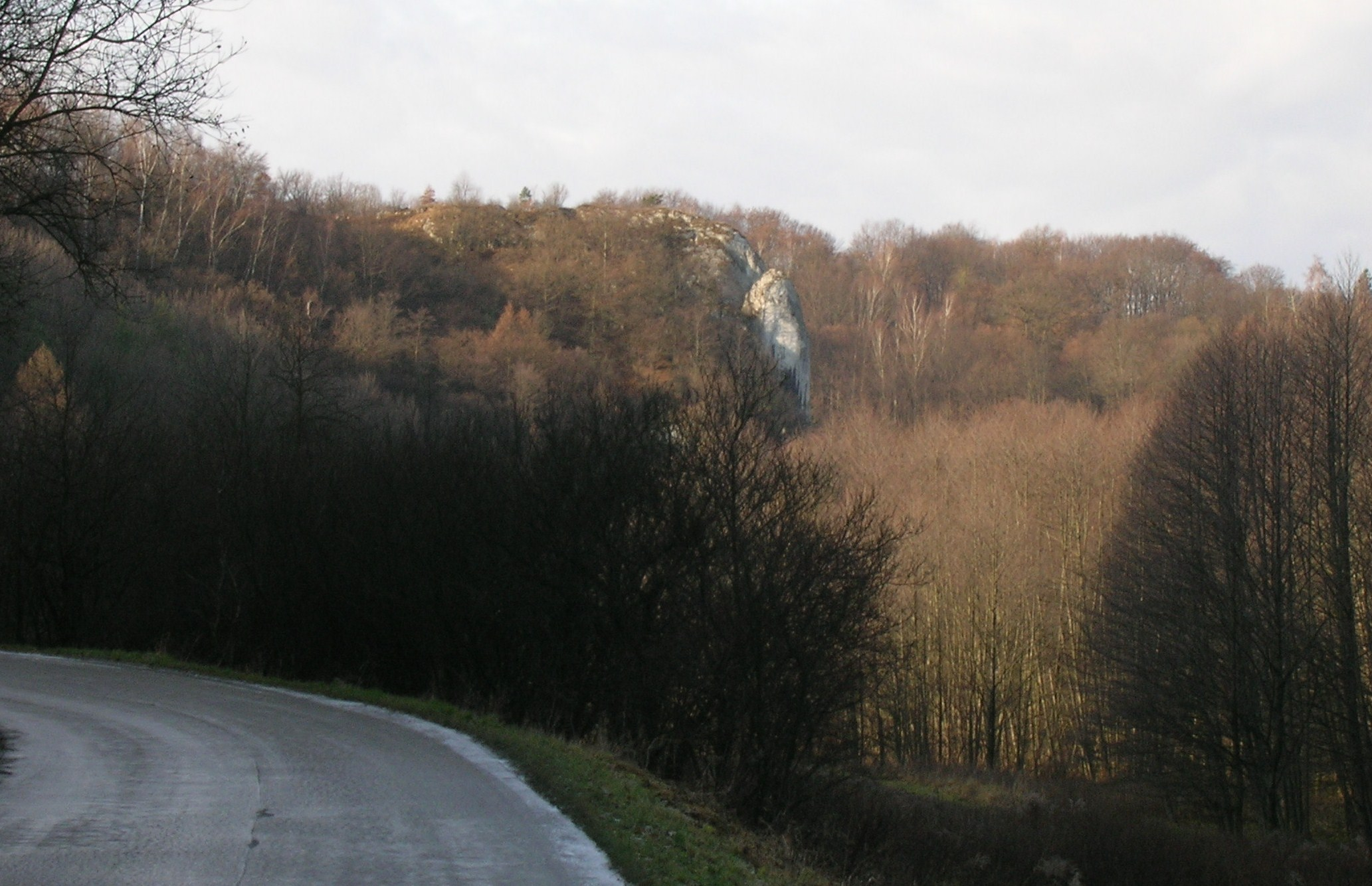 Dolina Sanki. Czułów